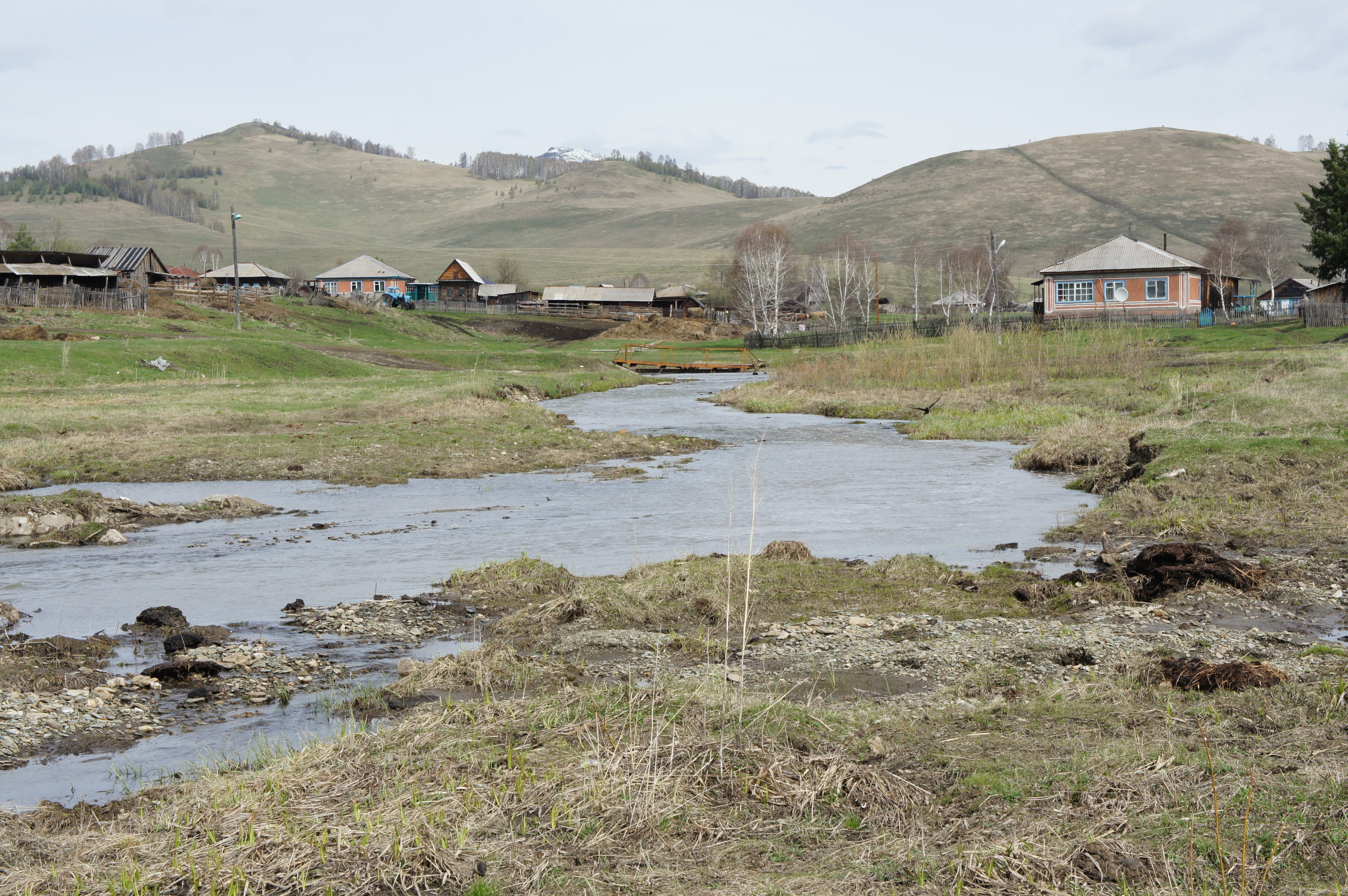 река Карама в с. Туманово Солонешенского района, в мае 2013 г.